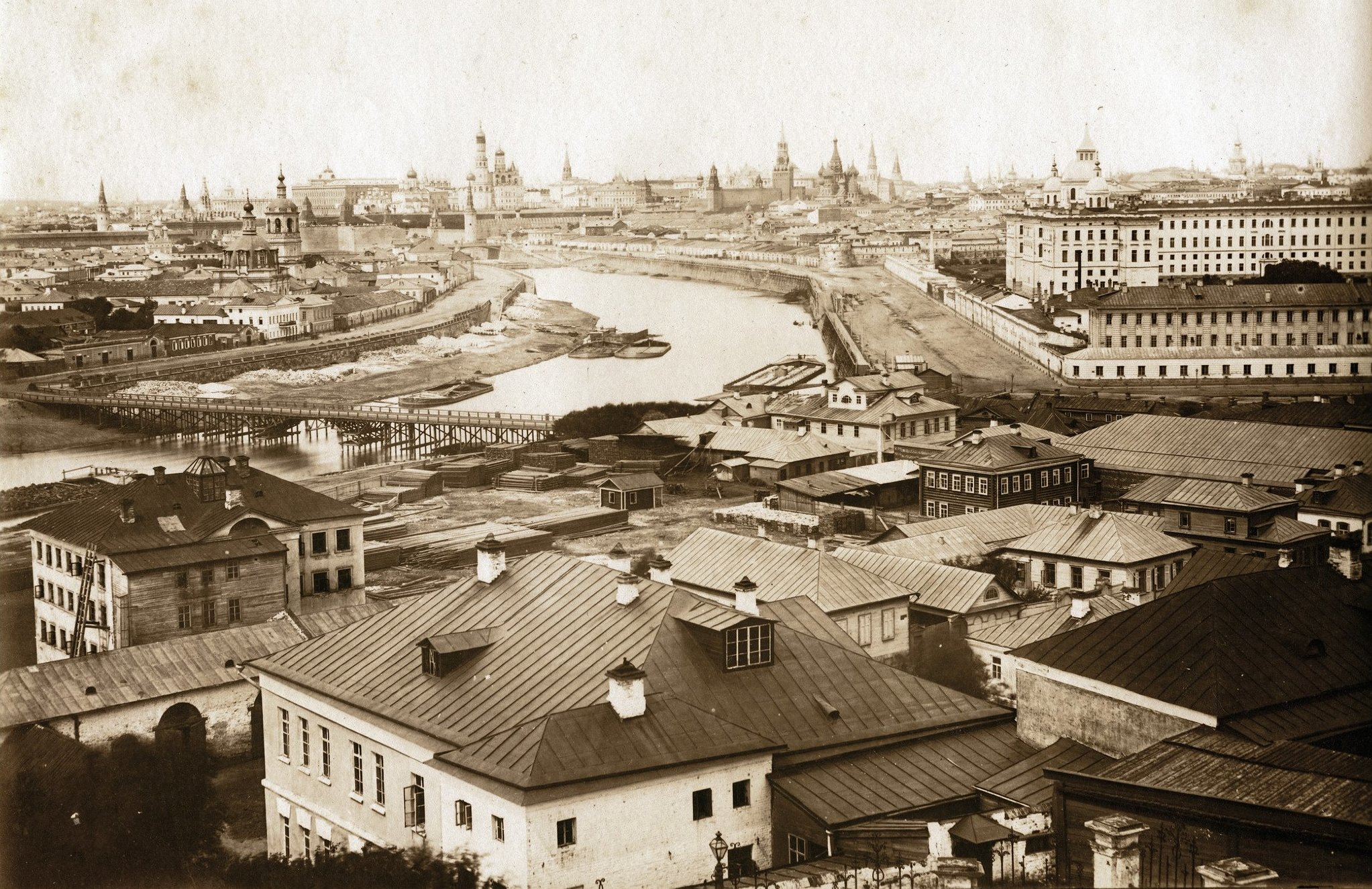 Вид Москвы (Фердинанд Бюро)